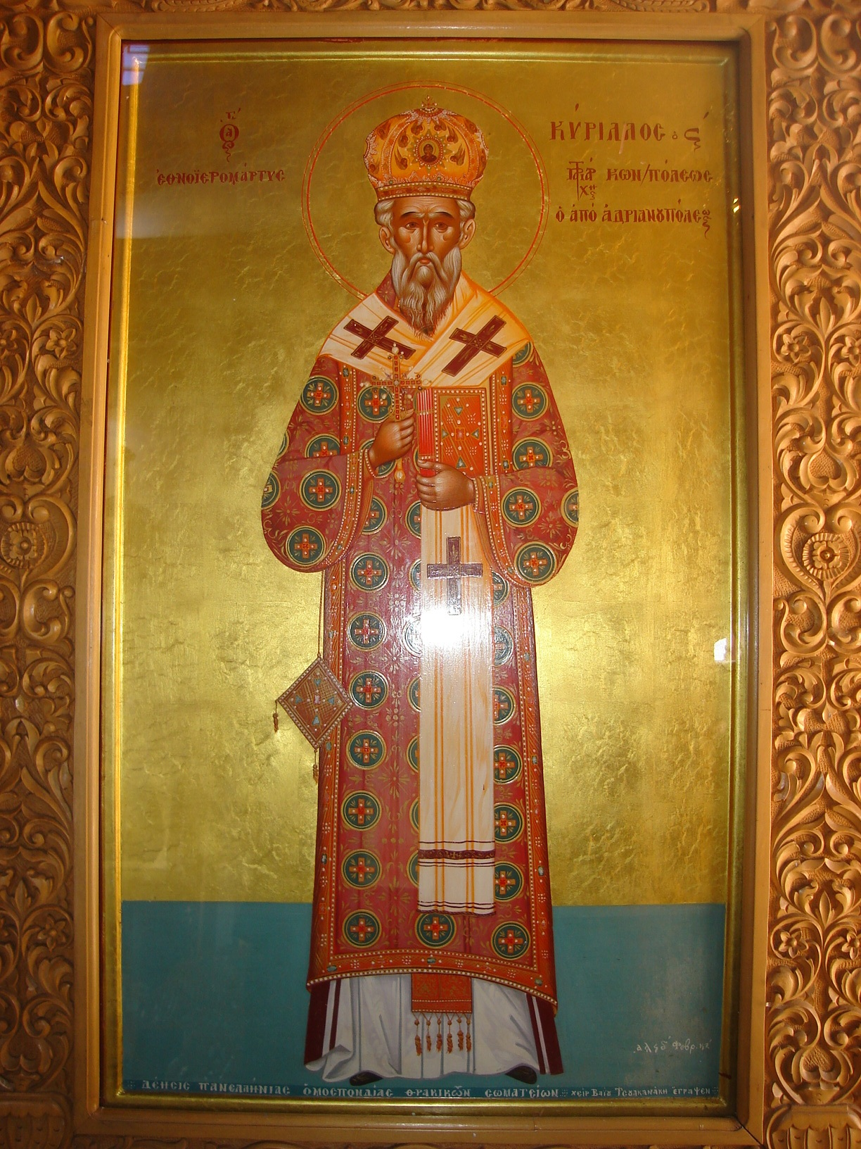 Πατριάρχης Κωνσταντινουπόλεως ο από Ανδριανουπολεως